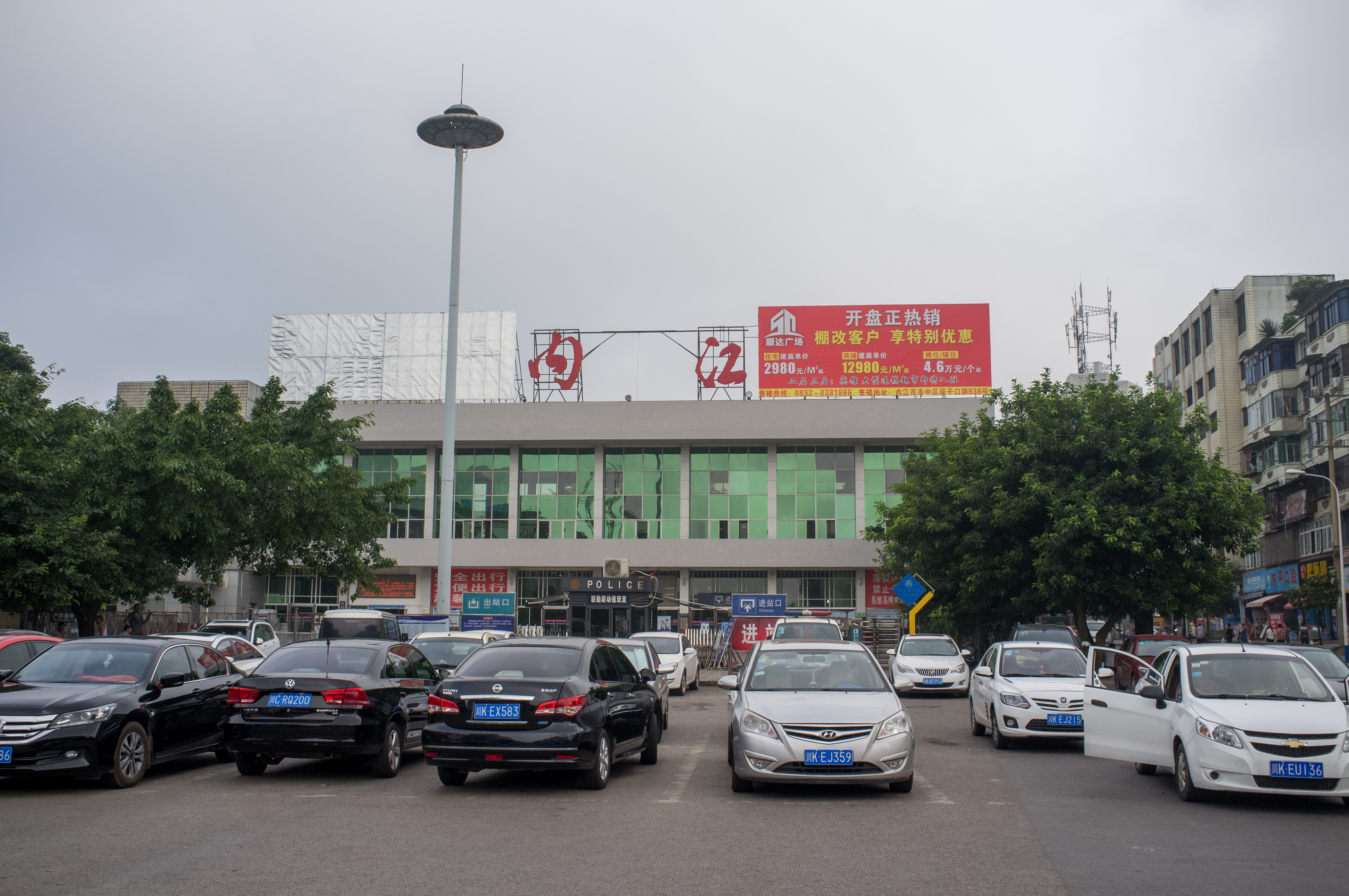 中文（中国大陆）: 成渝铁路内江站